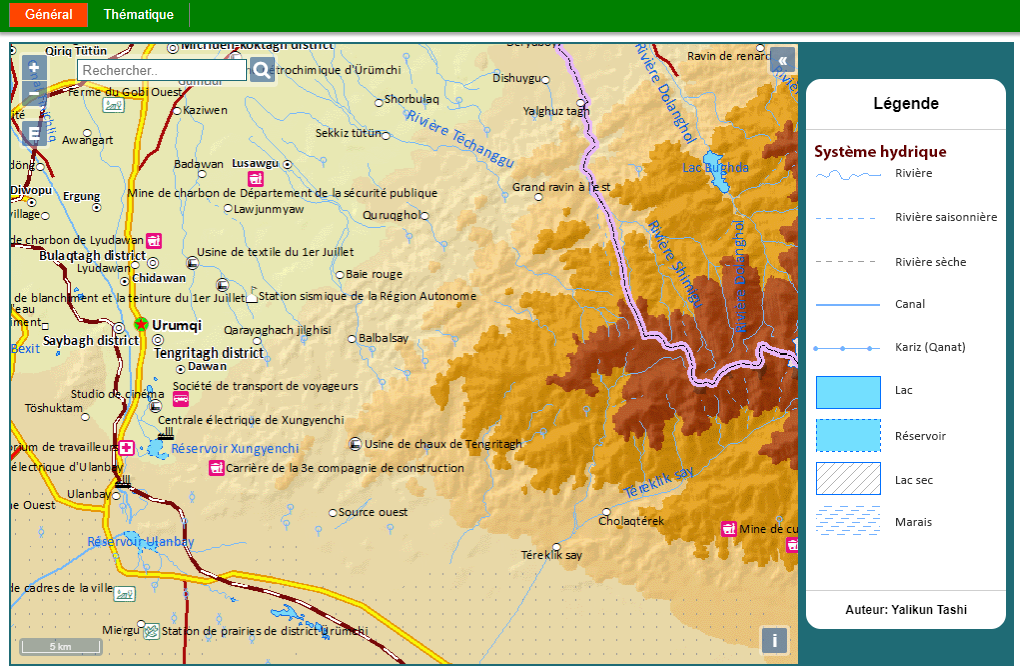 Makan Map carte générale